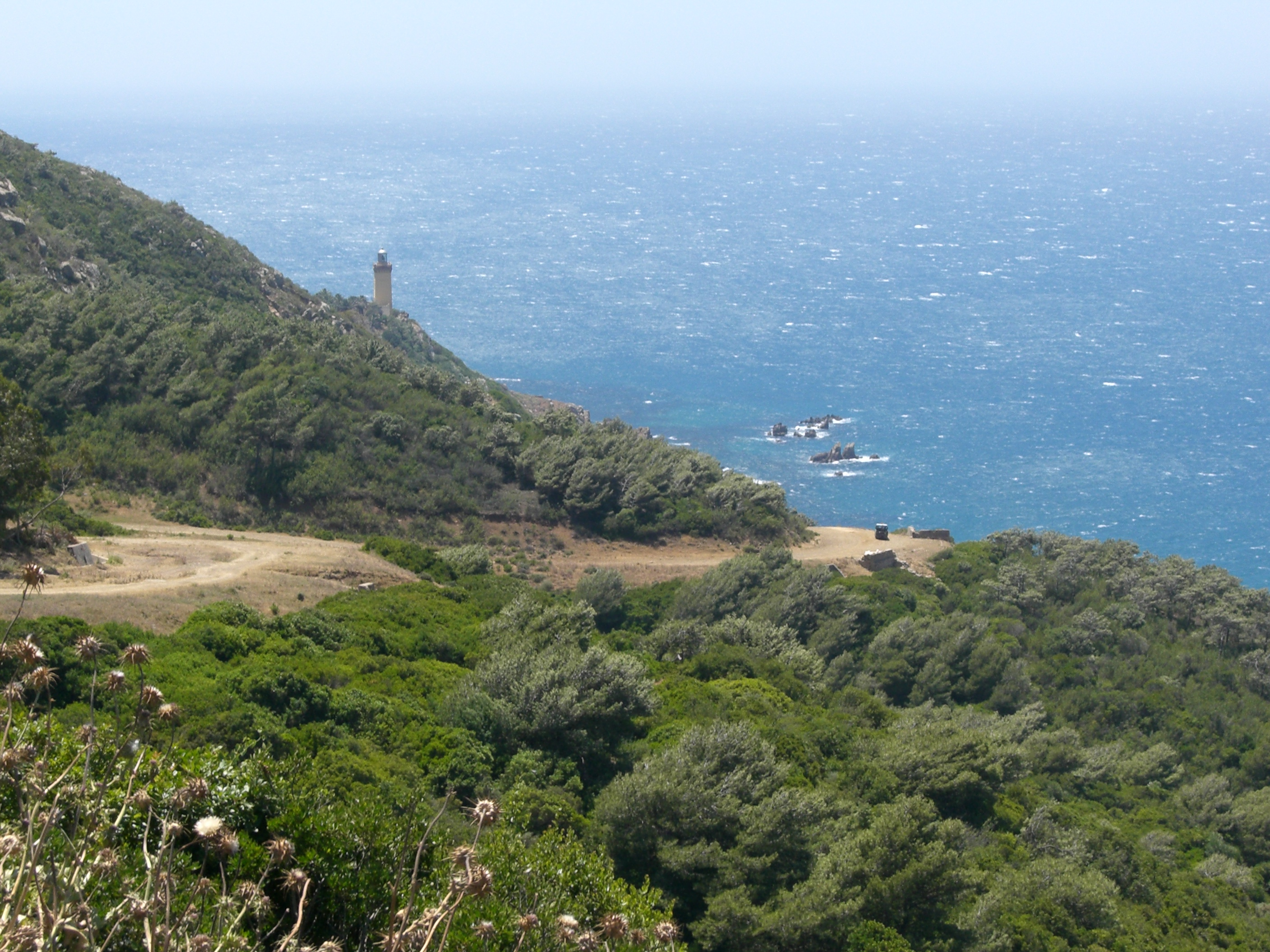 Cape Spartel, Morocco